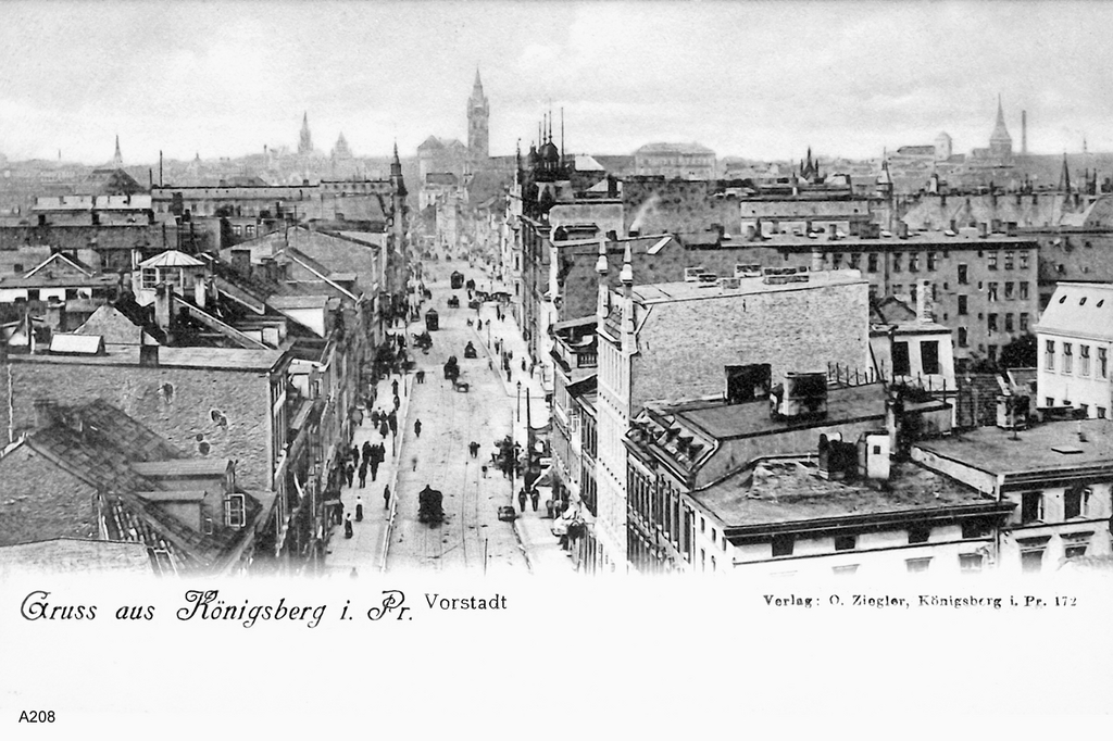 Königsberg